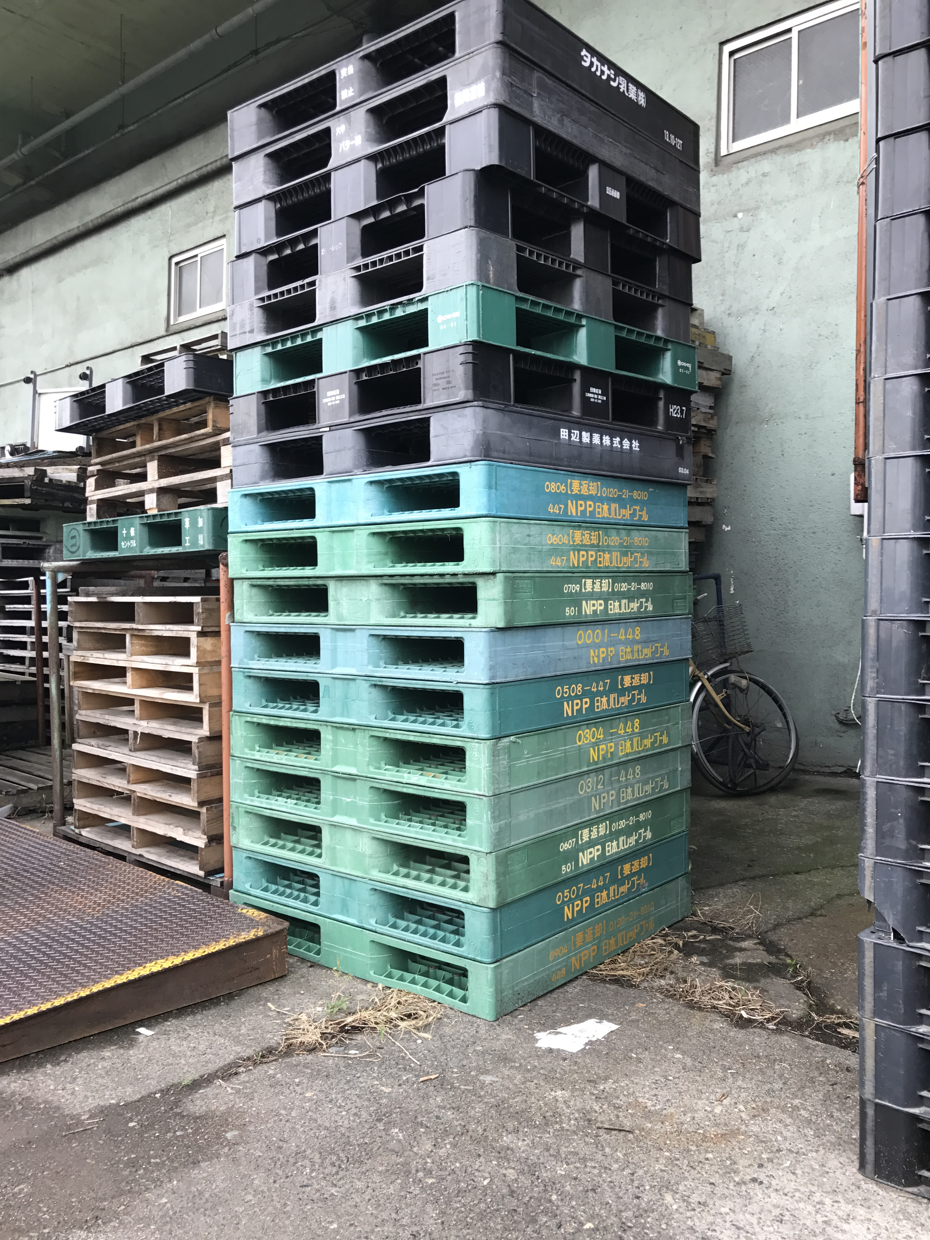 山下埠頭のある倉庫で積み上げられていたパレット。